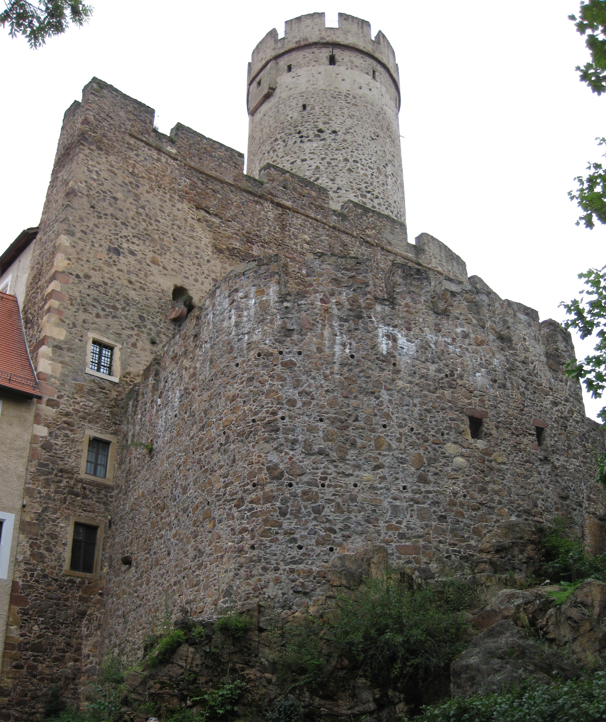 Burg Gnandstein ..Außenseite